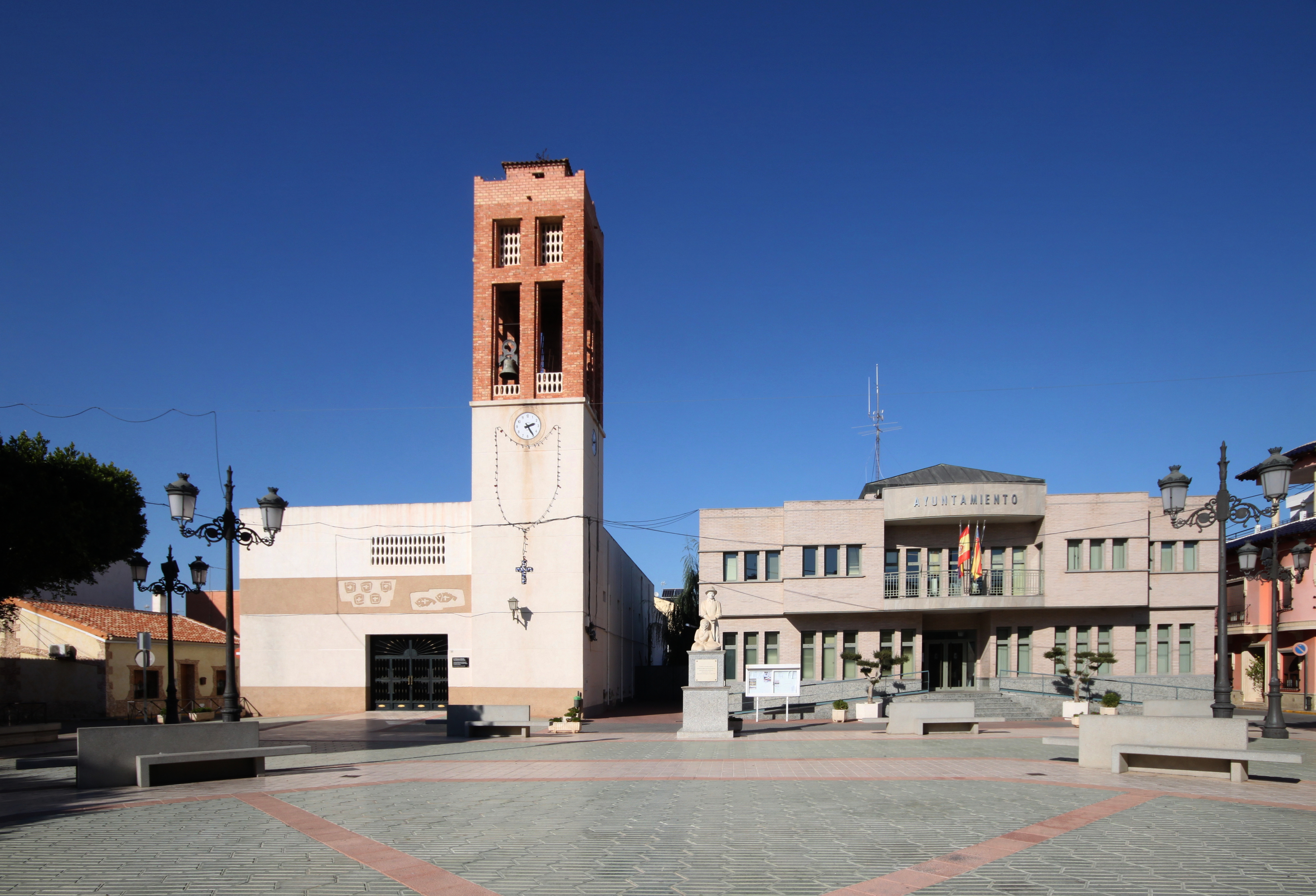 Formentera del Segura - Ayuntamiento e Iglesia